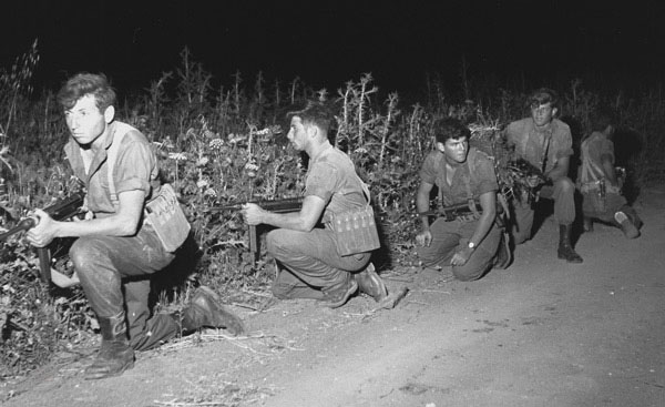 Меир Хар-Цион и Отряд 101